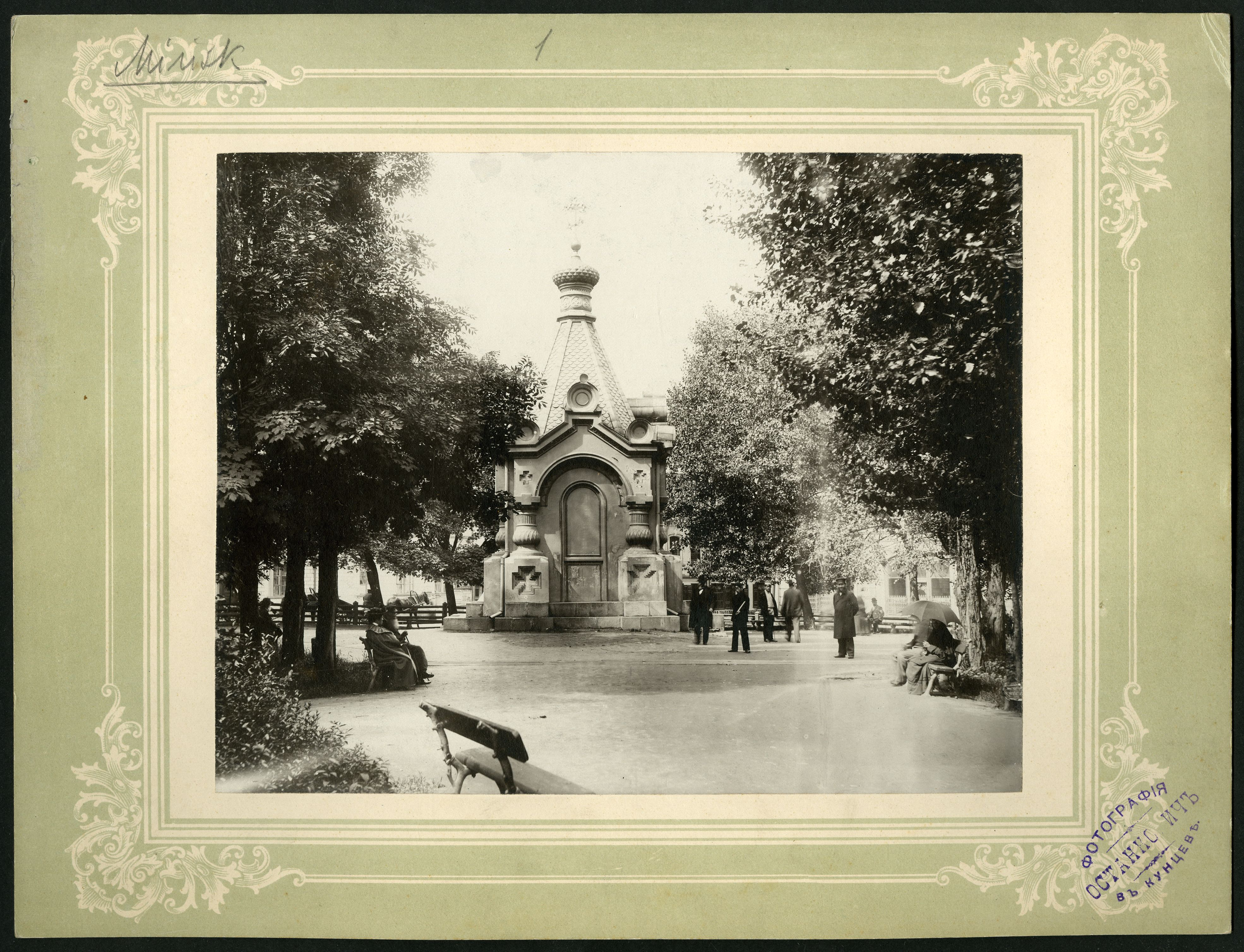 Беларуская (тарашкевіца): Менск (Miensk), Новае Места (Novaje Miesta). Мескі сквэр